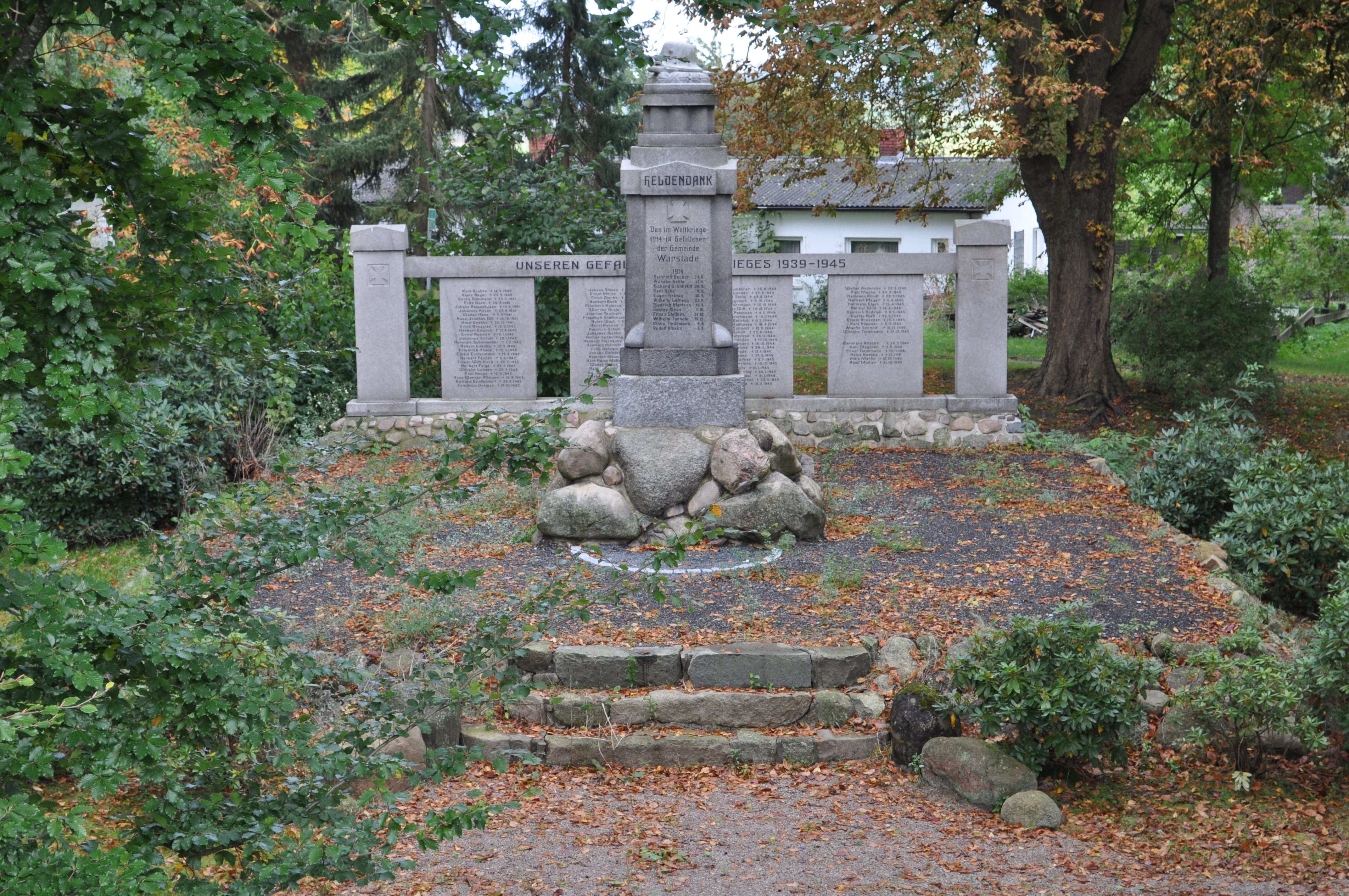 Kriegerdenkmal der ehemaligen Gemeinde Warstade, heute Stadtteil von Hemmoor. Vorne das Denkmal für die Opfer des Ersten Weltkriegs, dahinter das für die Opfer des Zweiten Weltkriegs. This is a photograph of an architectural monument. .202.200.005